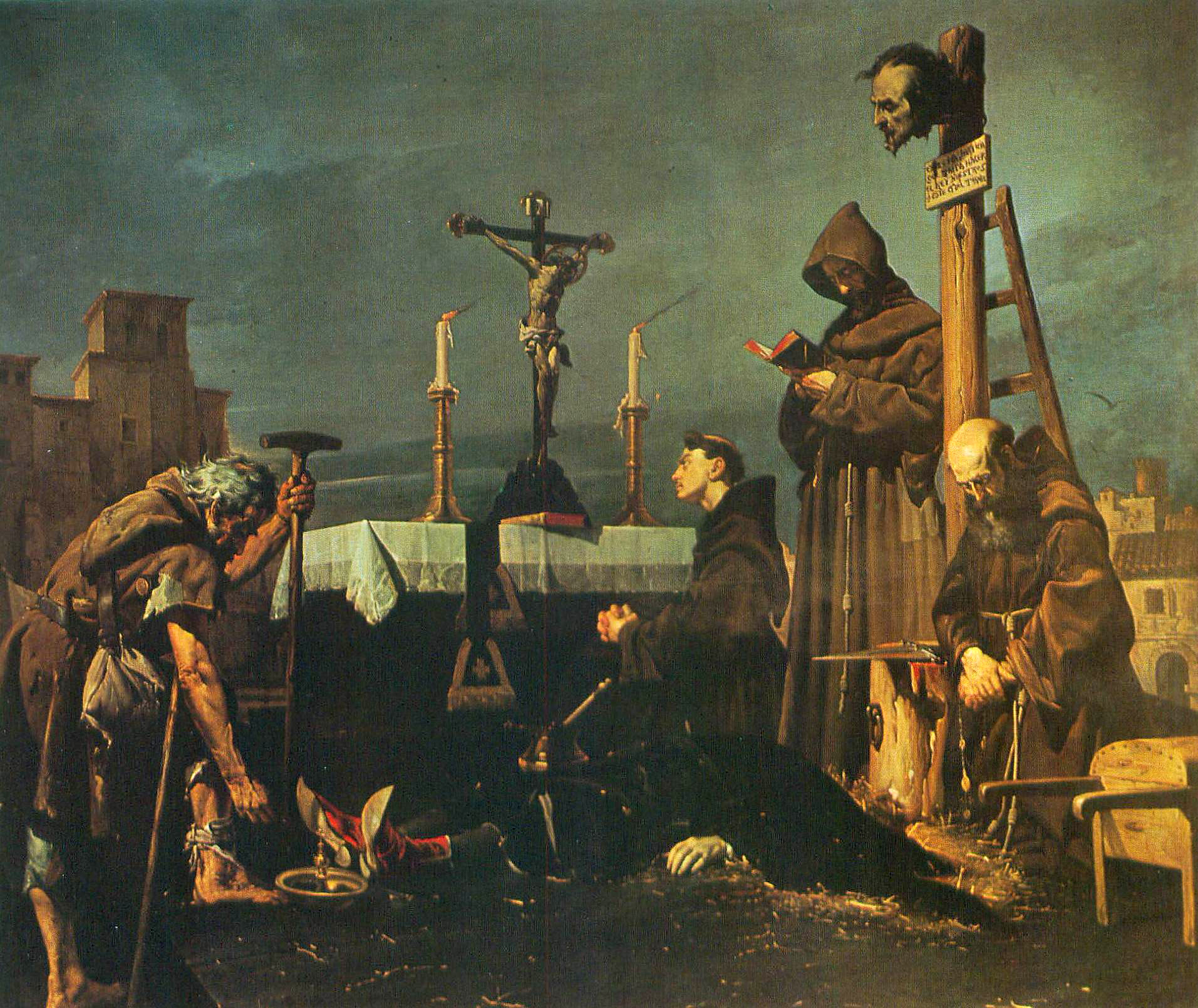 El lienzo representa la colecta para sepultar el cadáver de don Álvaro de Luna, maestre de la Orden de Santiago y privado del rey Juan II de Castilla. Álvaro de Luna fue decapitado en la Plaza mayor de Valladolid en junio de 1453 y sus restos mortales reposan en la actualidad en la catedral de Toledo.